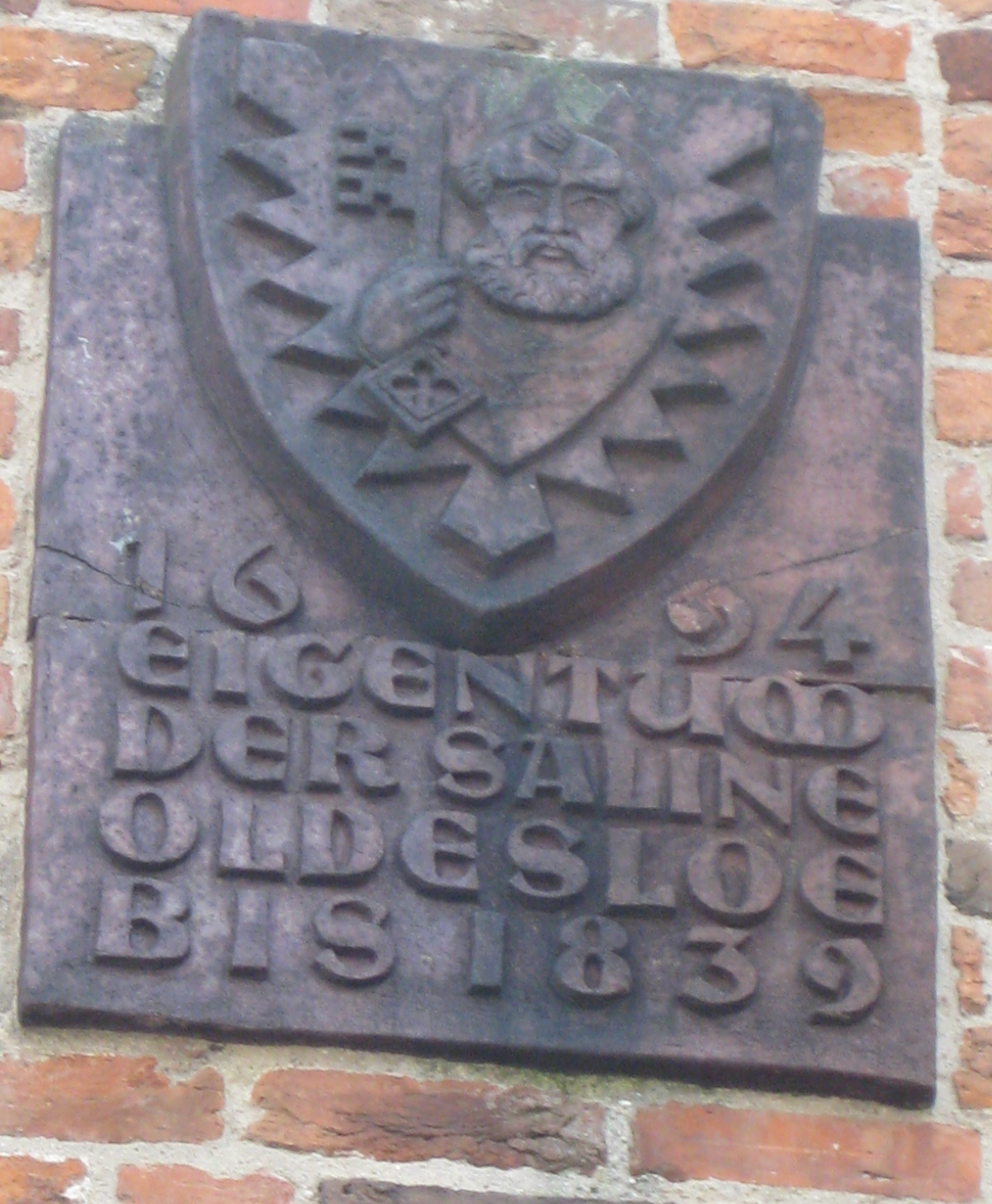 Erinnerungstafel an den Salzhandel mit Bad Oldesloe (über die Trave). Platte aus Klinkerkeramik (an den Lübecker Salzspeichern gegenüber vom Holstentor).